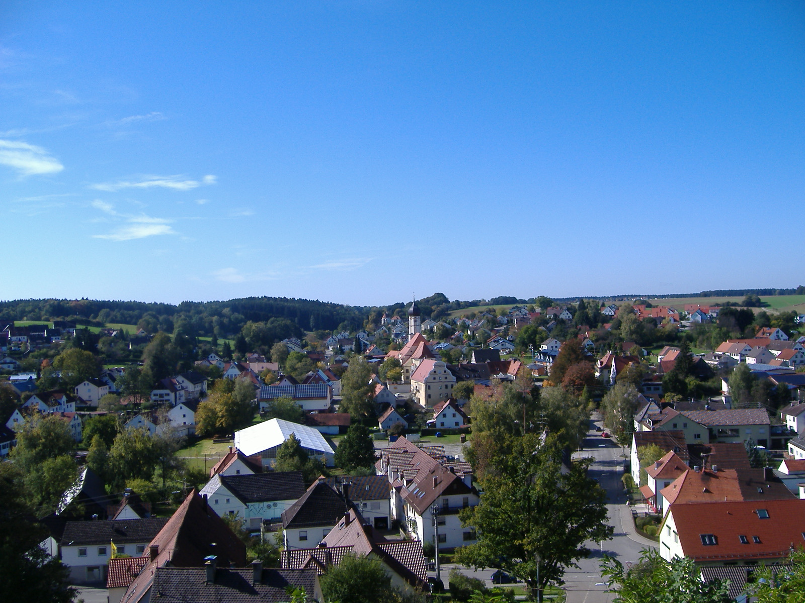 Welden